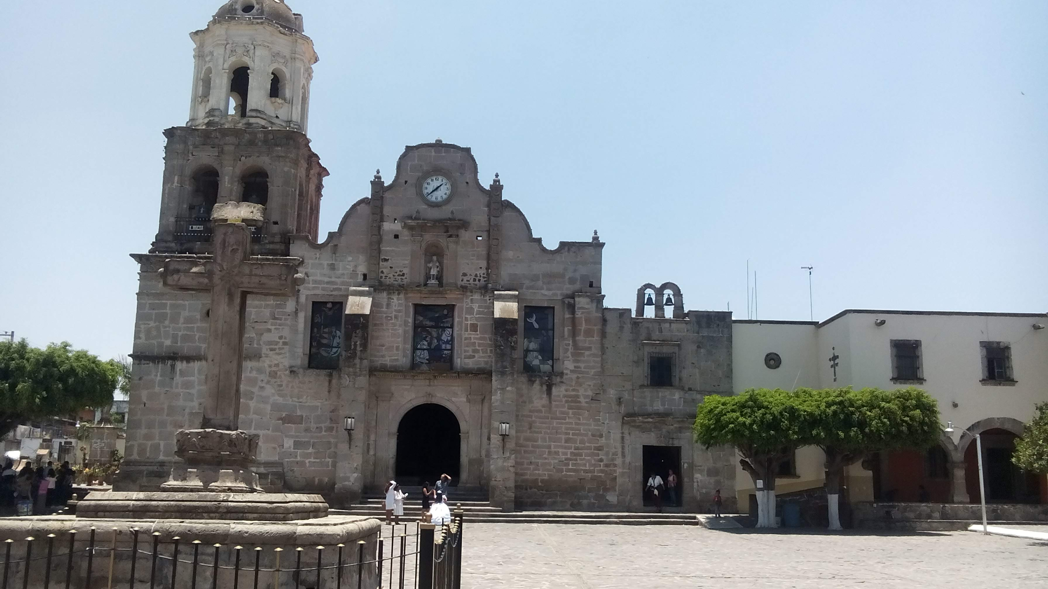 Es un templo de la religión católica hecho de roca, posee una torre y un reloj.